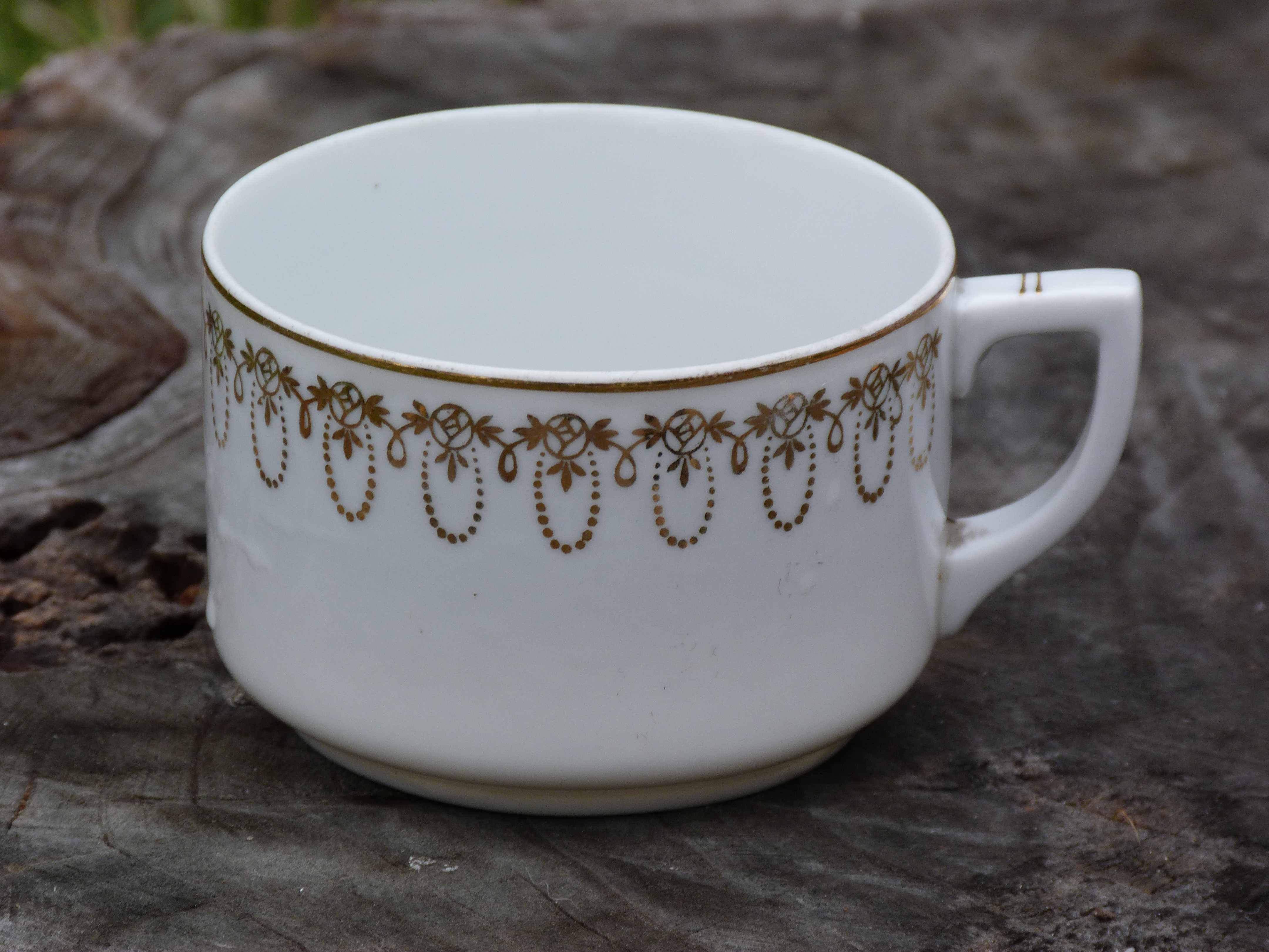 A felvétel 2013. december 14 –én készült. A Drasche Gyár (Kőbánya, Külső Jászberényi út) által gyártott pohár. Forrás: ©© Derzsi Elekes Andor, Budapest, 2013, You are authorised to use these photos and vids under Creative Commons – even for commercial, for profit purposes. Photos must be attributed to Derzsi Elekes Andor. All of the photos and vids in the Metapolisz DVD line are under Creative Commons and can be used even for commercial – for profit – purposes. Recommended Citation Derzsi Elekes Andor: Metapolisz DVD line